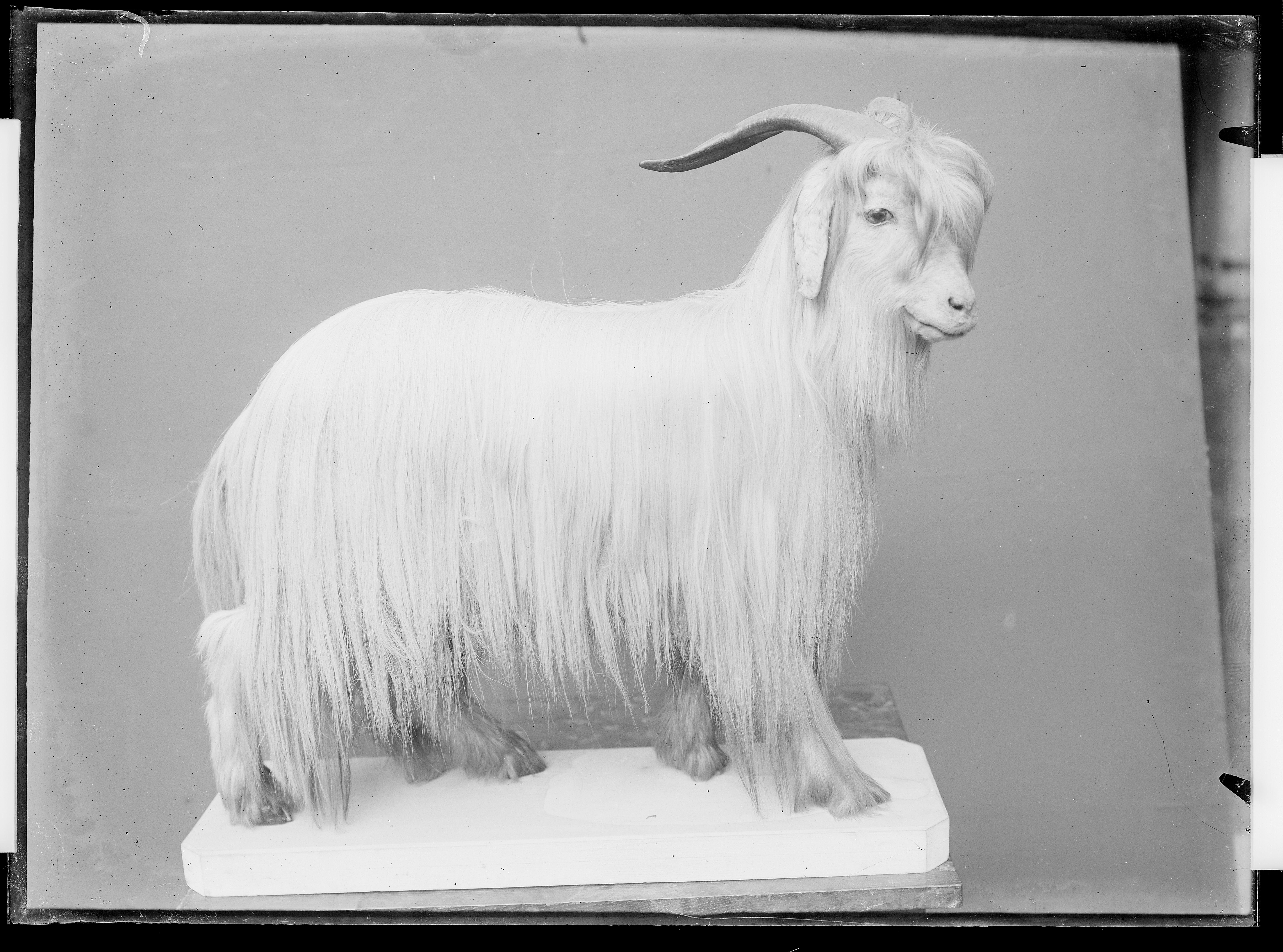 plaque négative au gélatino-bromure d'argent format 13x18cm. Sans inscription ni mention d'auteur.